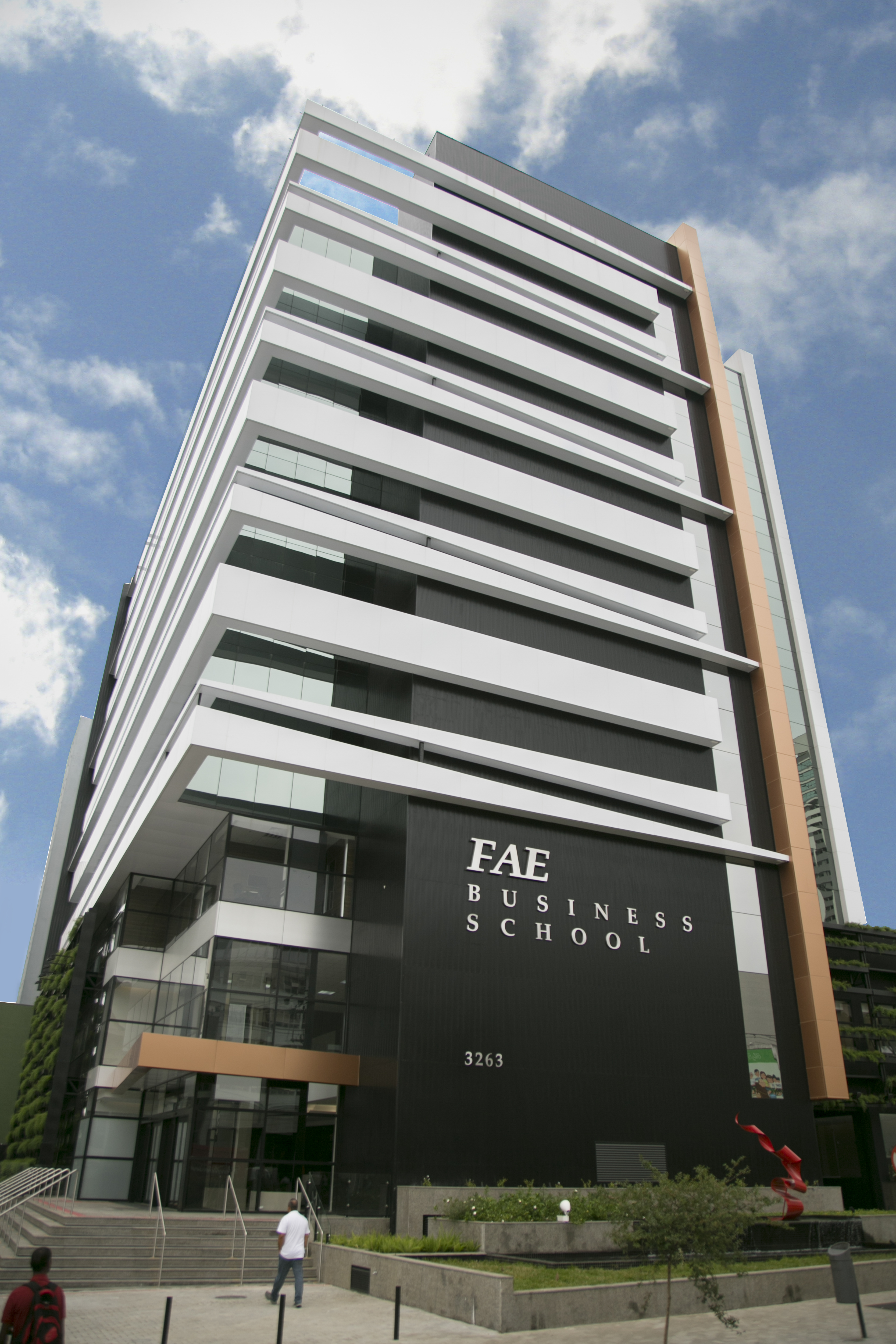 Campus da FAE Business School inaugurado em 2016 na cidade de Curitiba - PR.